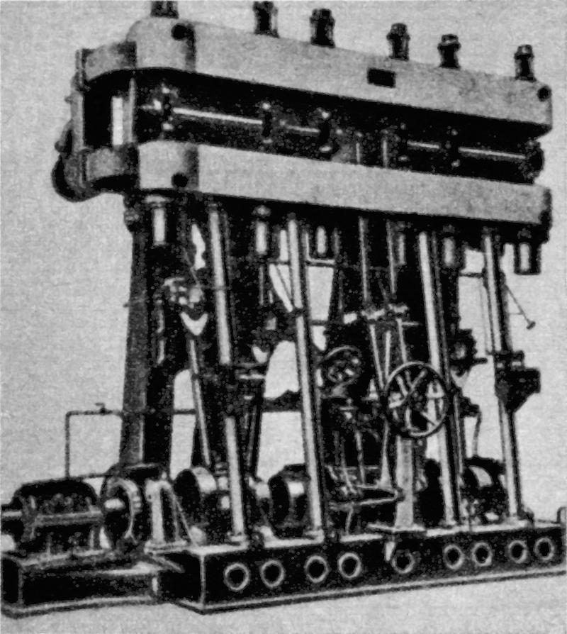 SS Olza steam engine